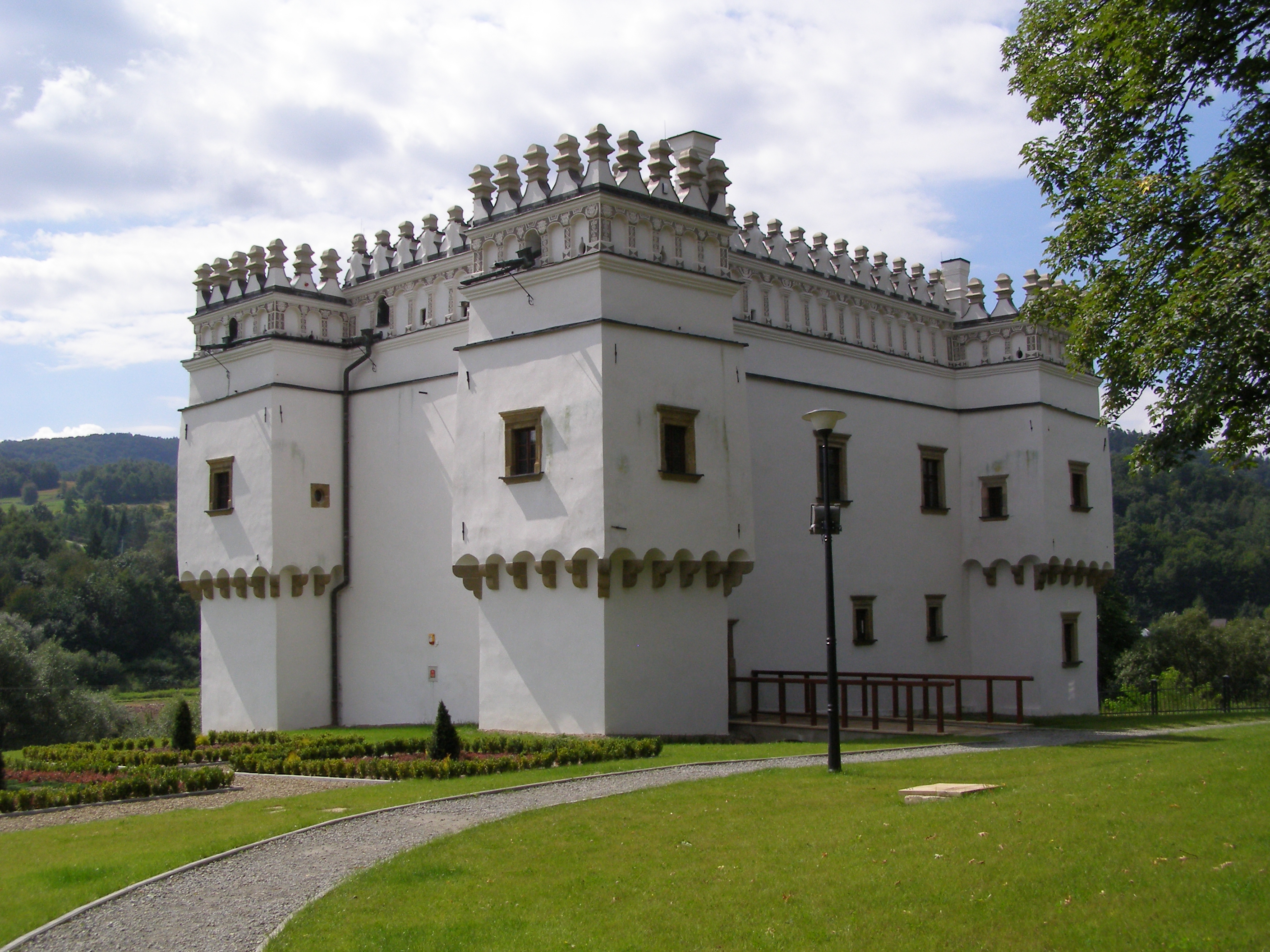 Szymbark (woj. małopolskie) - kasztel Gładyszów